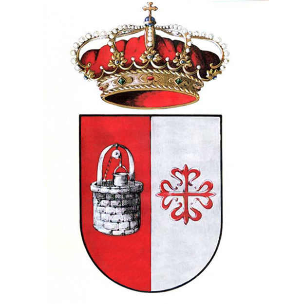 Escudo de armas del municipio de Pozuelo de Calatrava, en la provincia de Ciudad Real, diseñado y aprobado por la Real Academia de la Historia (30/06/95).